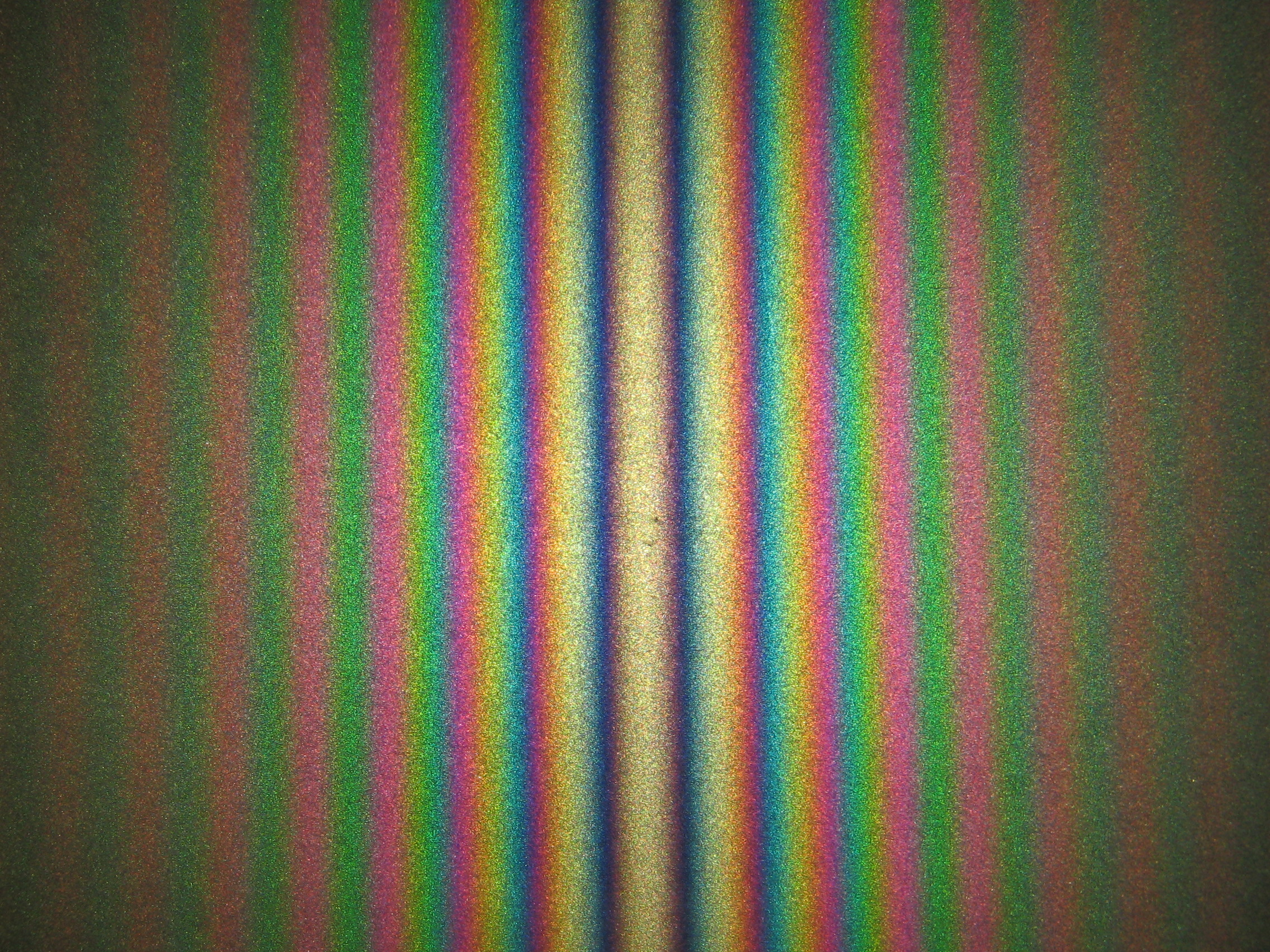 interféromètre de Michelson réglé en coin d'air éclairé par une lampe blanche